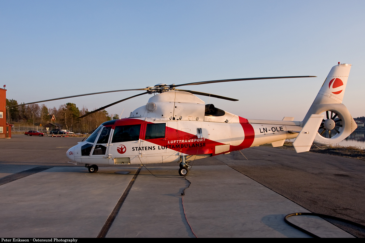 LN-OLE @ Göviken